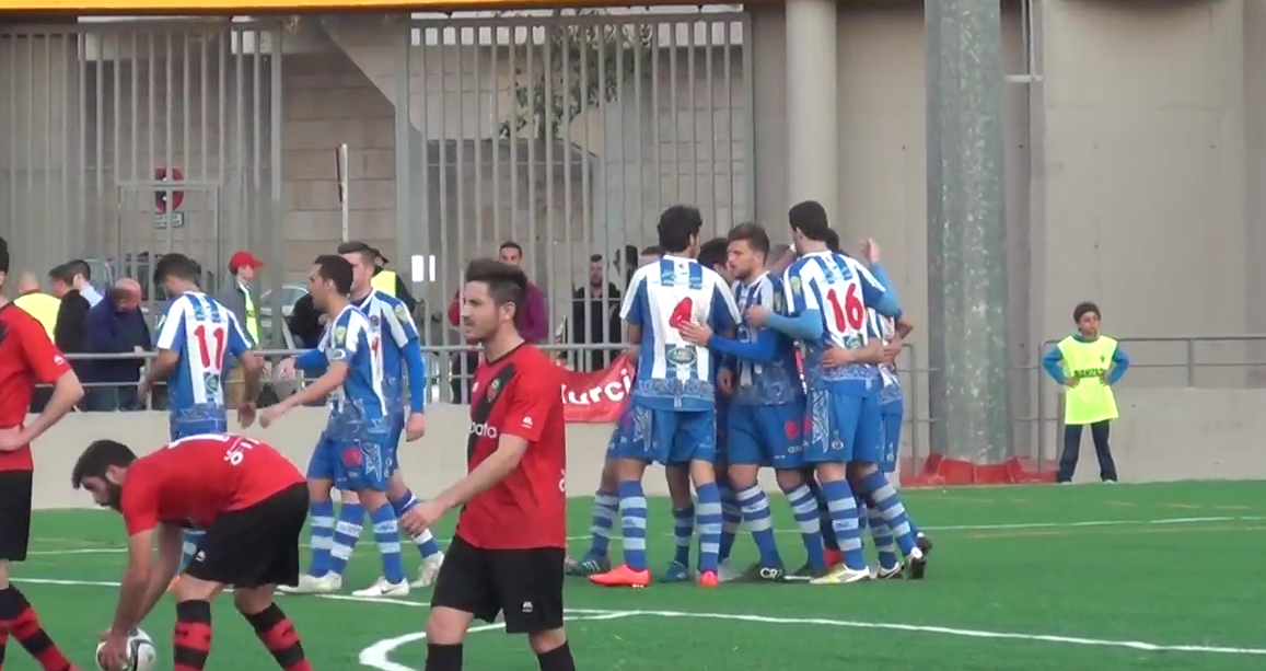 CAP Ciudad de Murcia - CF Lorca Deportiva (13-03-2016)